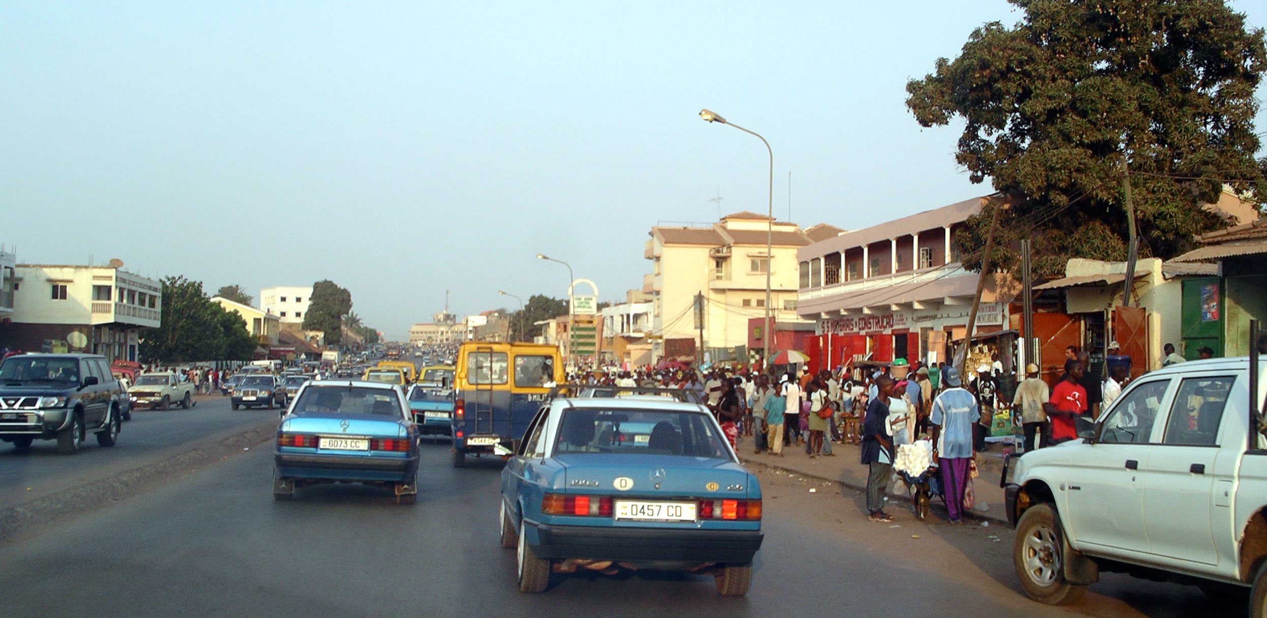 Stroossenzeen zu Bissau.